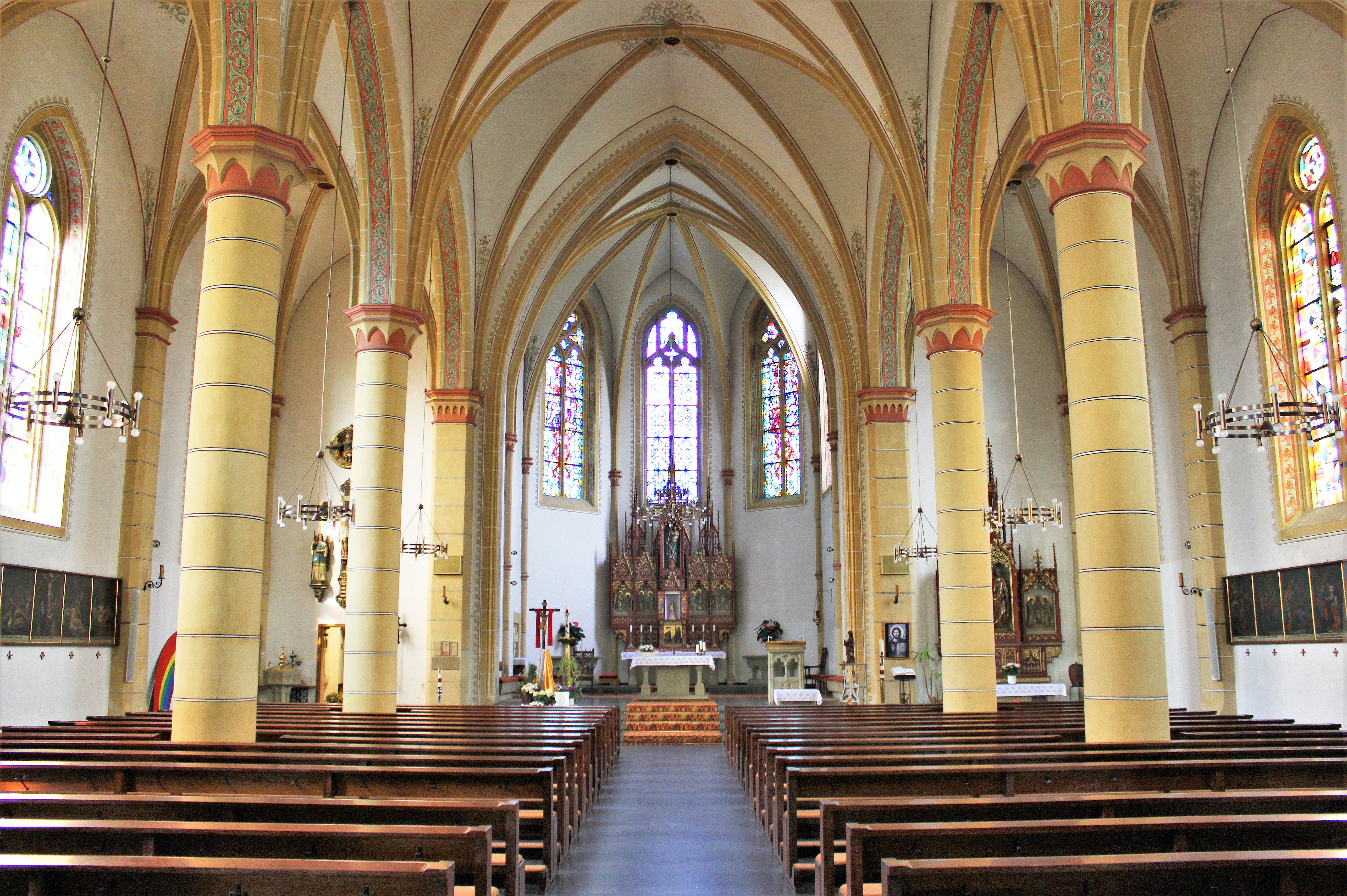 Blick ins Innere der katholischen Pfarrkirche Mariä Himmelfahrt in Marpingen, Landkreis St. Wendel, Saarland